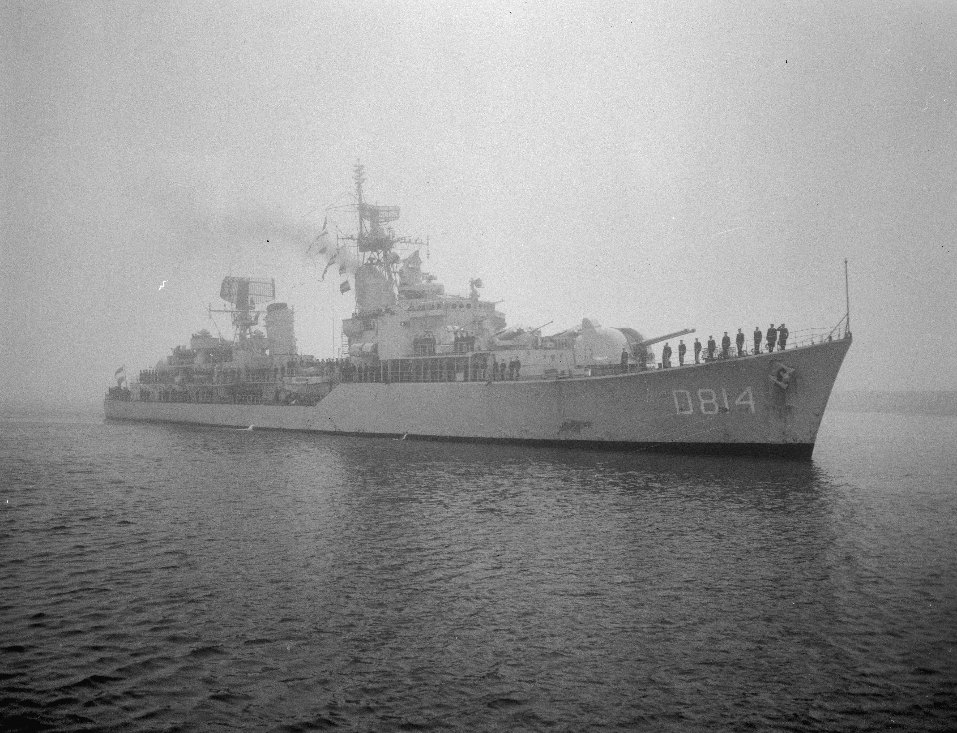 Collectie / Archief : Fotocollectie Anefo Reportage / Serie : [ onbekend ] Beschrijving : Aankomst Hr. Ms. Jagers "Limburg" en "Groningen" te Nieuwdiep, aankomst jager "Limburg" Datum : 20 december 1960 Locatie : Den Helder Trefwoorden : marine, schepen Fotograaf : Bilsen, Joop van / Anefo Auteursrechthebbende : Nationaal Archief Materiaalsoort : Negatief (zwart/wit) Nummer archiefinventaris : bekijk toegang 2.24.01.04 Bestanddeelnummer : 911-8931